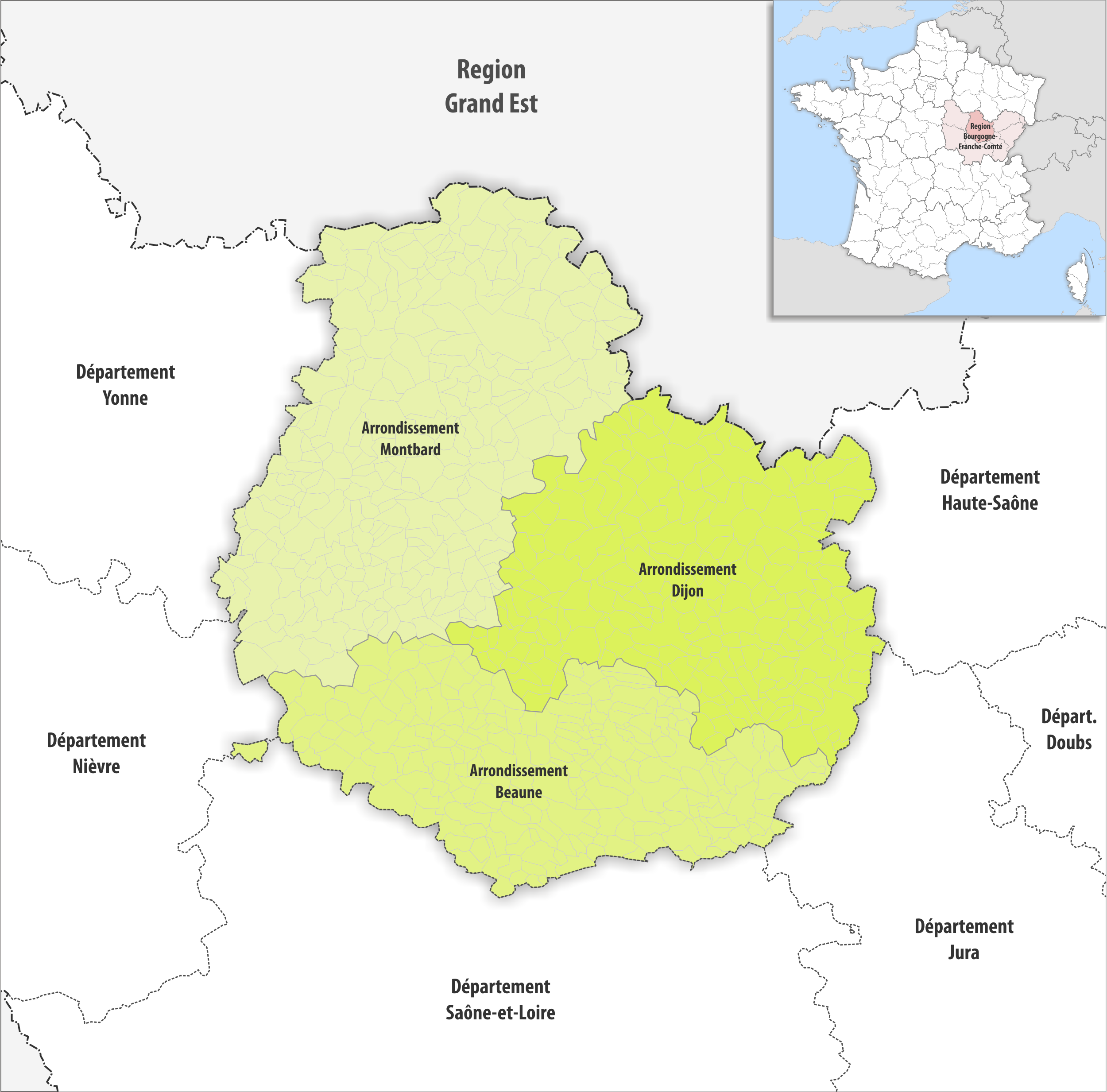 Gemeinden und Arrondissemente im Departement Côte-d’Or